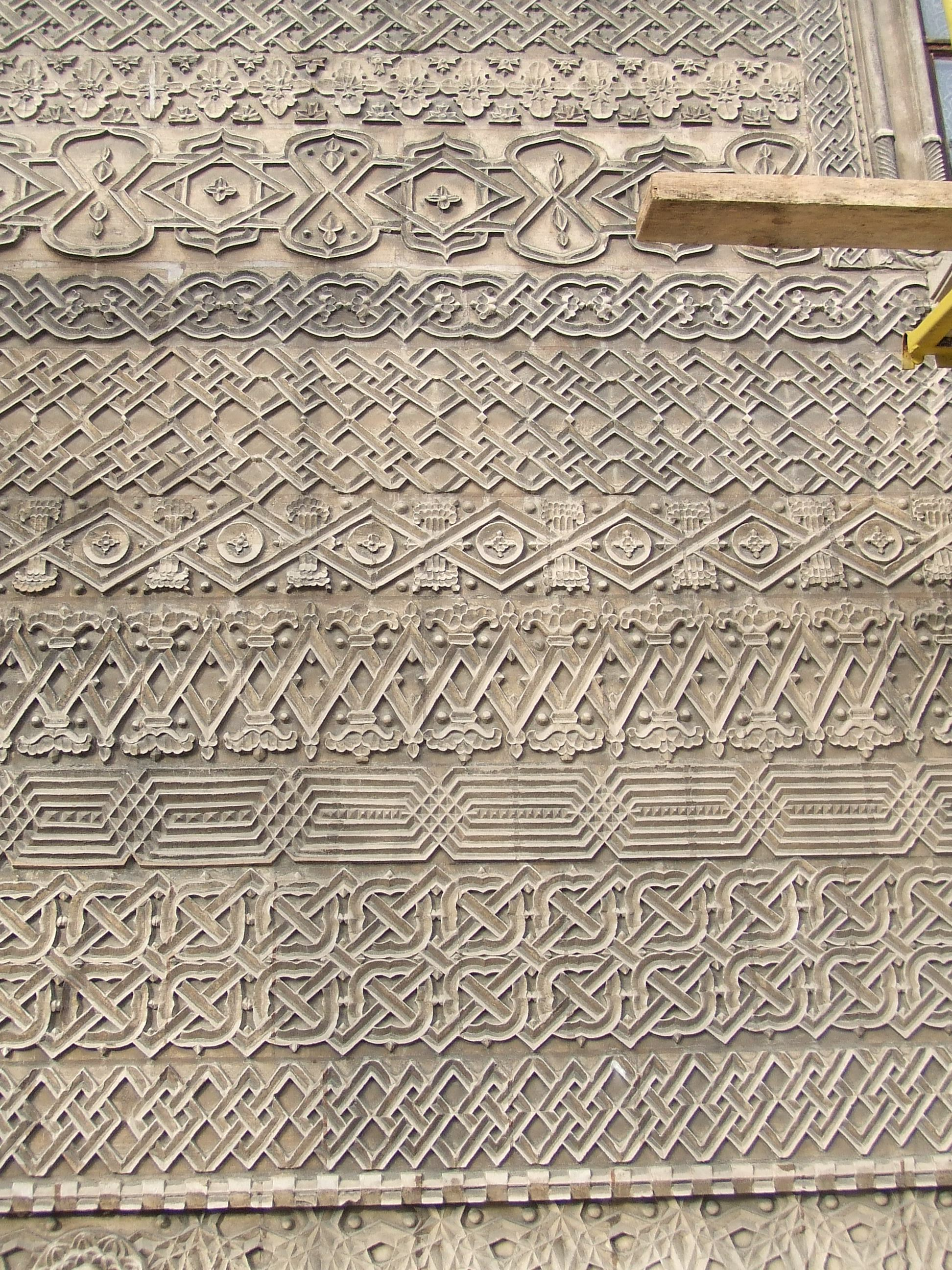 Mănăstirea Sfinţii Trei Ierarhi din Iaşi